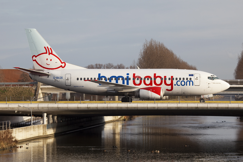 G-BVZE B737-500 BMI Baby